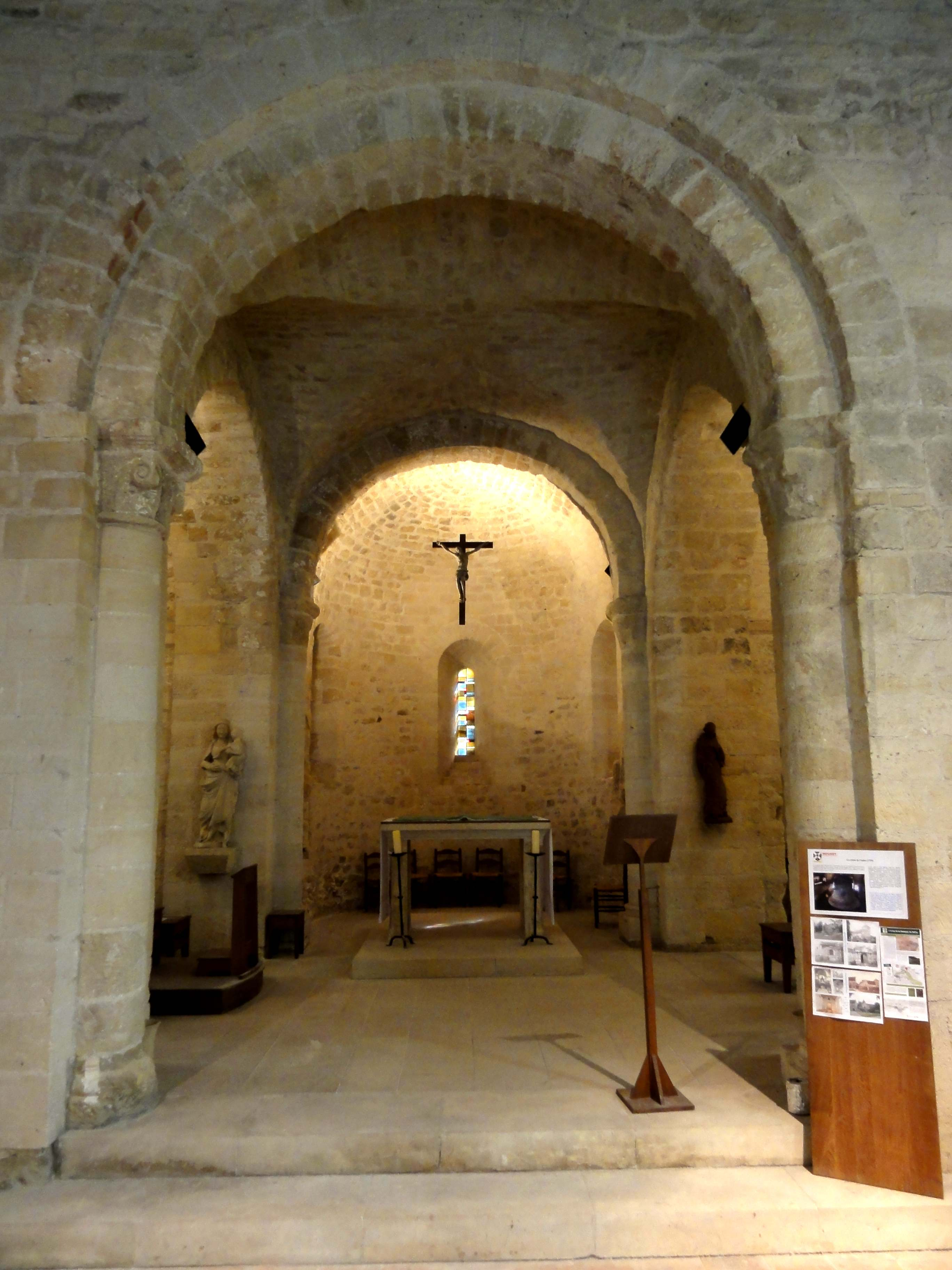 Intérieur de l'église - voir titre.